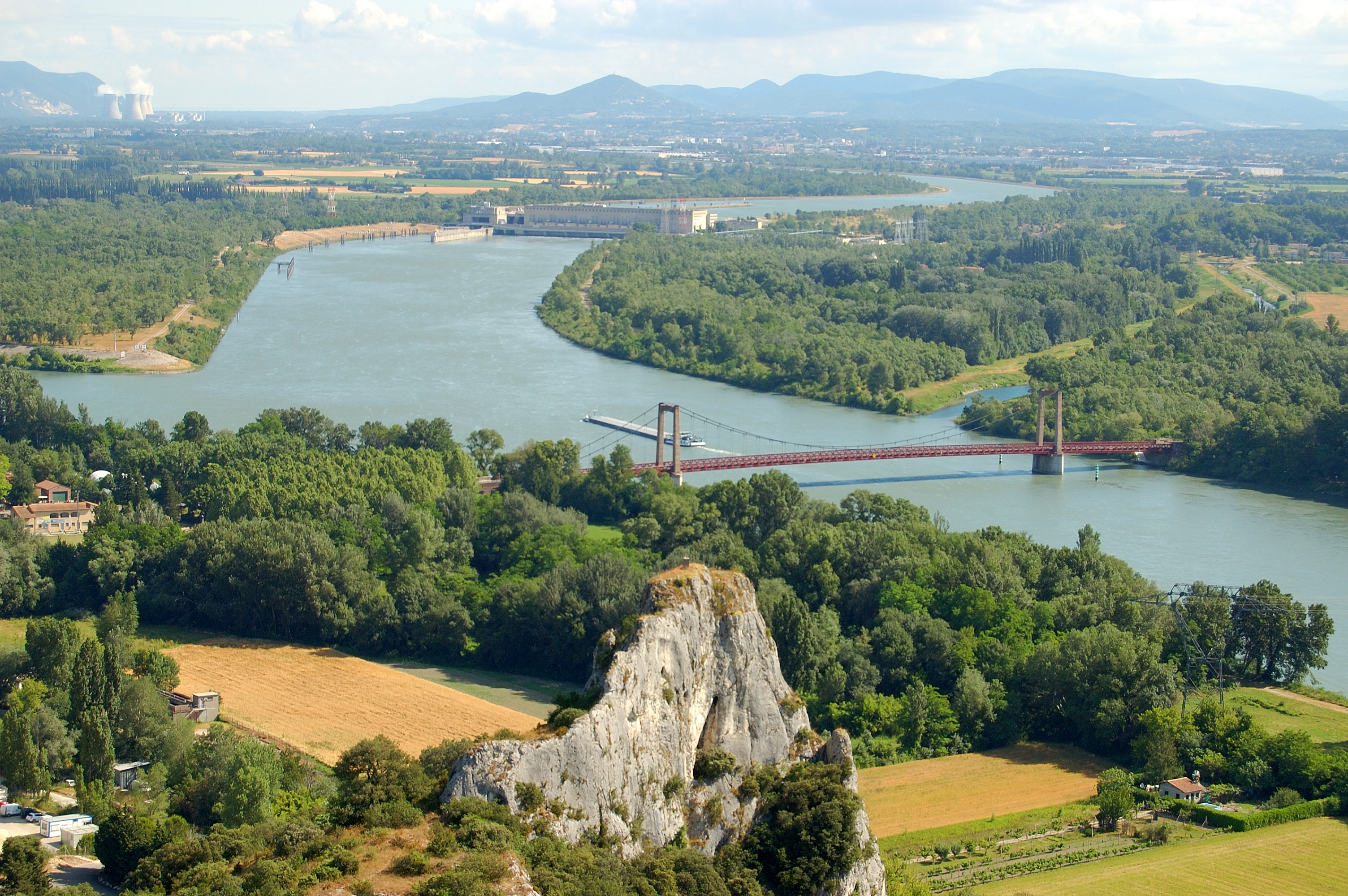 Le Rhône, vu de la montagne St Michel